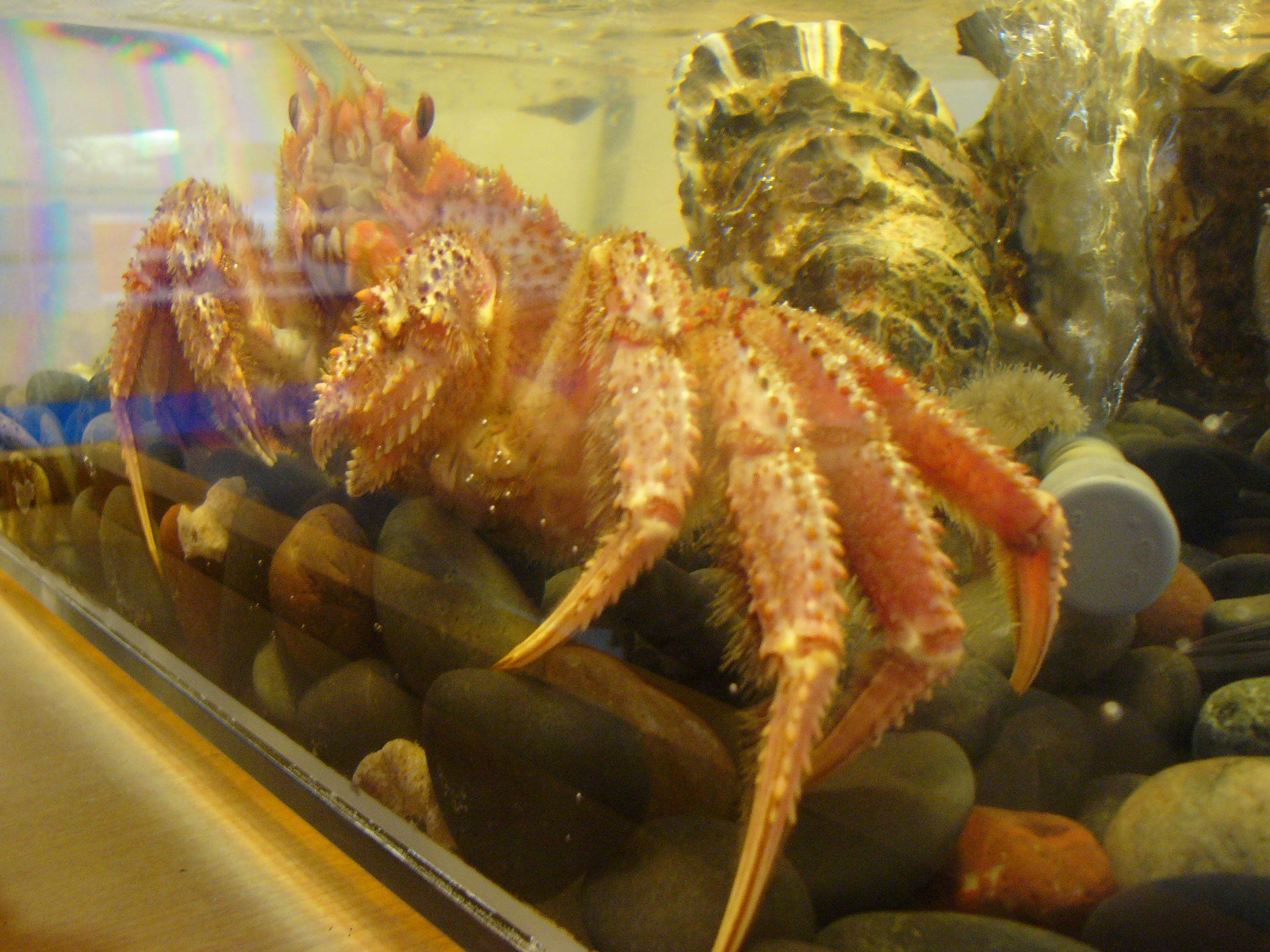 Erimacrus isenbeckii（ケガニ）, Hokkaido, Japan